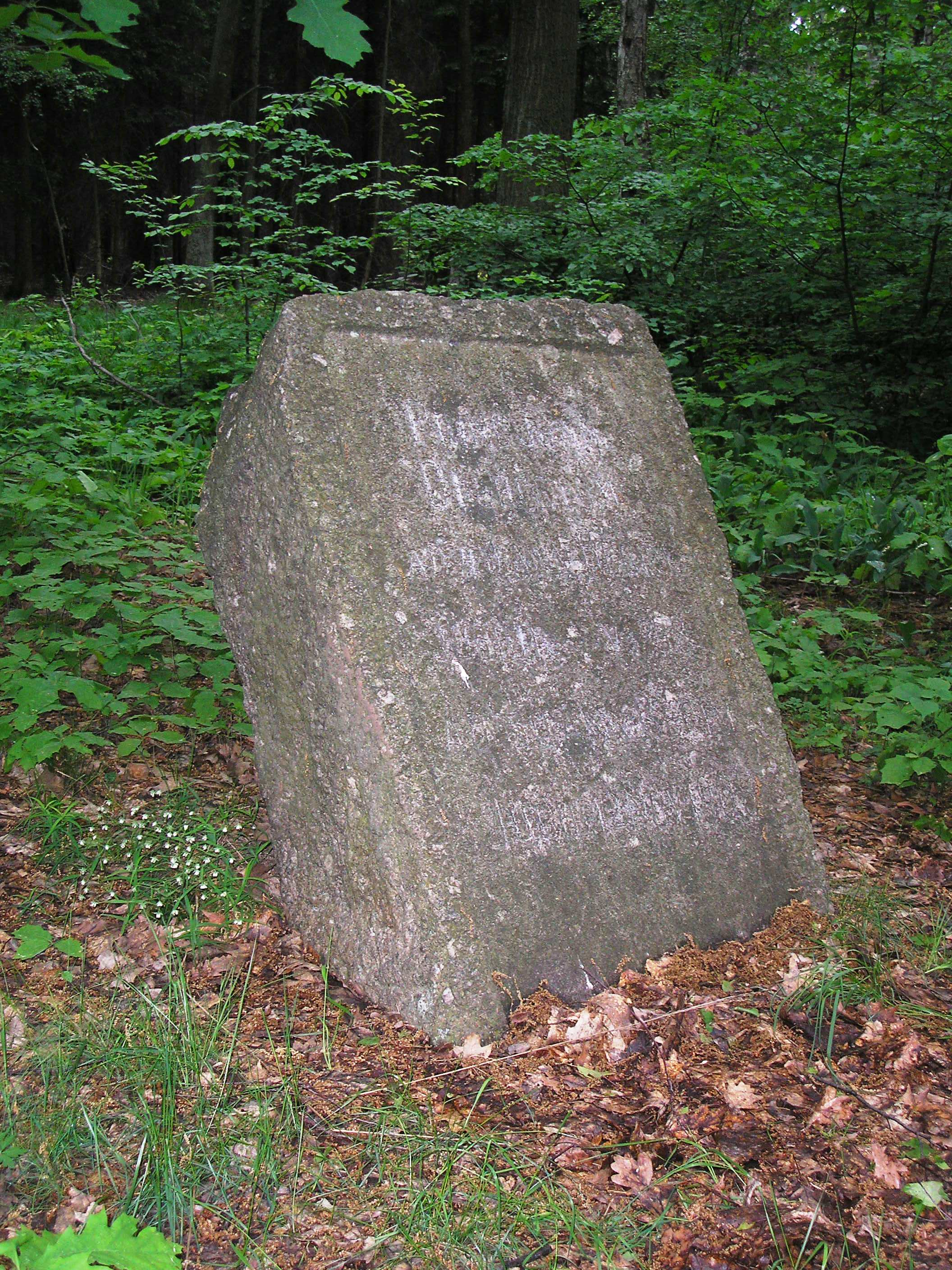 Lichtenštejnský kámen v Klánovickém lese.